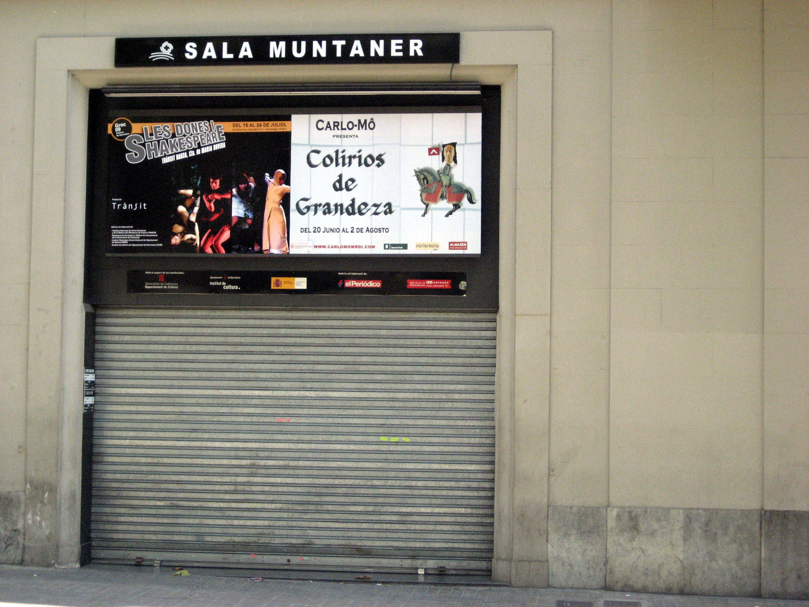 Porta d'accés a la Sala Muntaner de Barcelona (agost 2009)